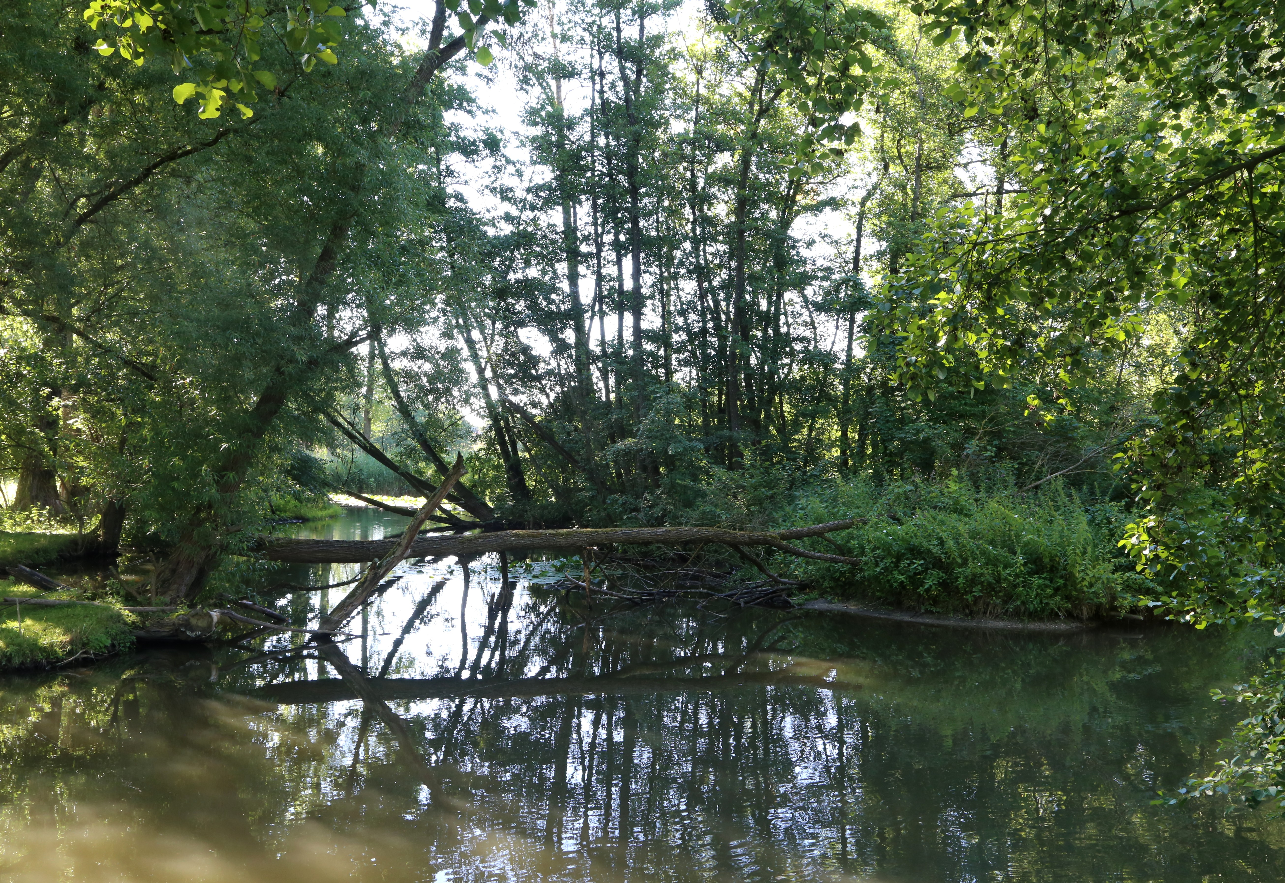 Der Fluss Paar im Landschaftsschutzgebiet Schutz der Paarauen in den Gemeinden Hörzhausen, Peutenhausen und der Stadt Schrobenhausen, Landkreis Schrobenhausen, südwestlich von Schrobenhausen